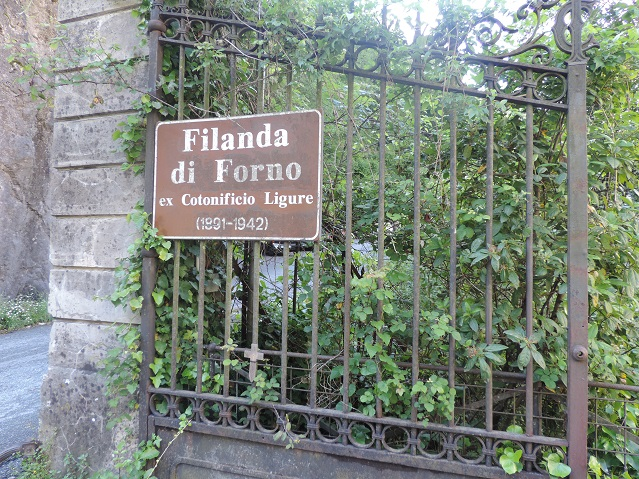 cancello con targa della Filanda di Forno (Massa) nel 2017